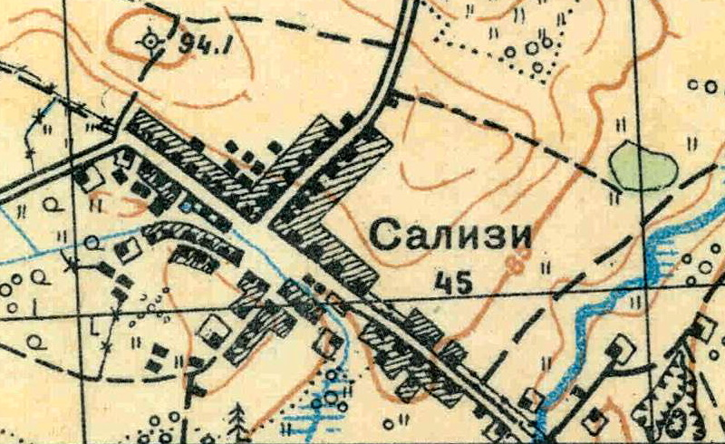 Топографическая карта Ленинградской области, квадрат О-36-13-А-а (Большая Пудость), деревня Котельниково